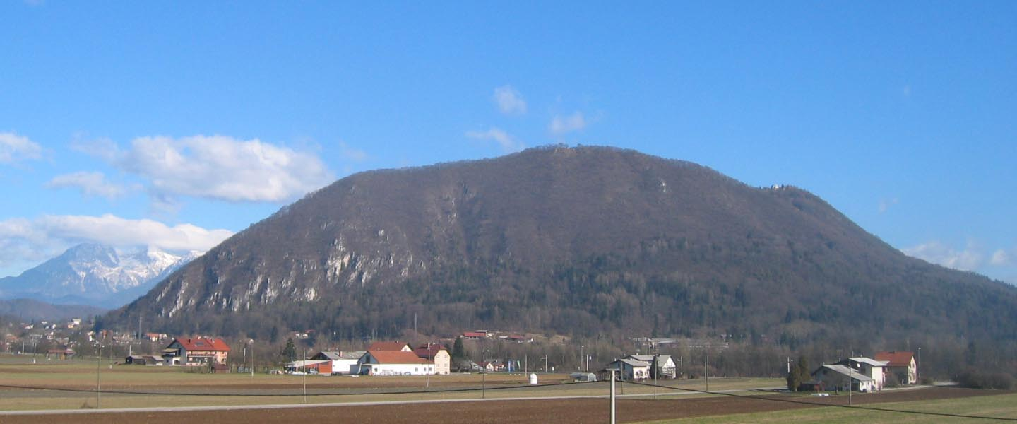 Šmarna gora, hill near Ljubljana, Slovenia photo:Ziga 22:12, 8 February 2007 (UTC)